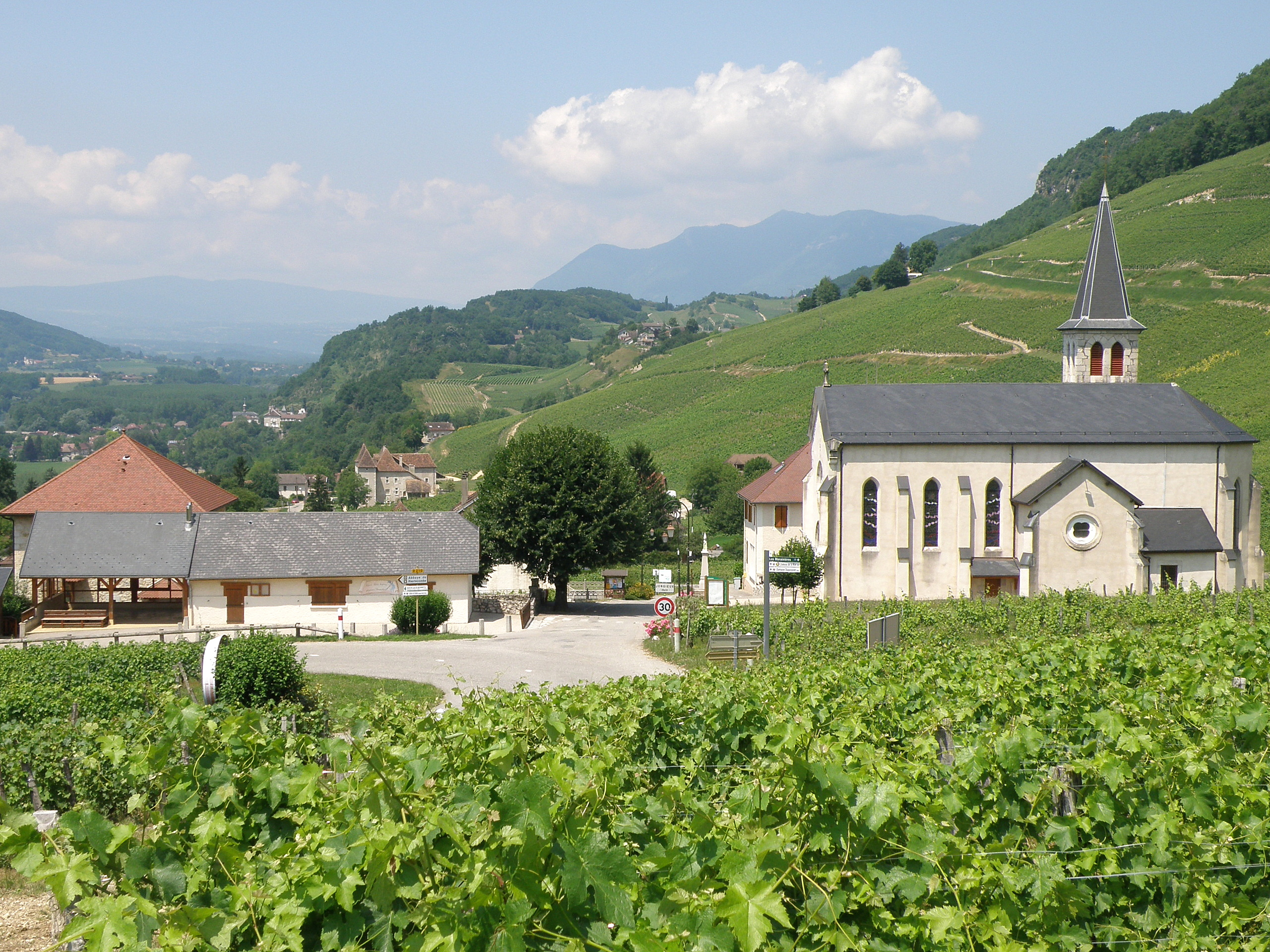 Jongieux, comm. du départ. de la Savoie (région Rhône-Alpes, France). Vue générale depuis le sud.